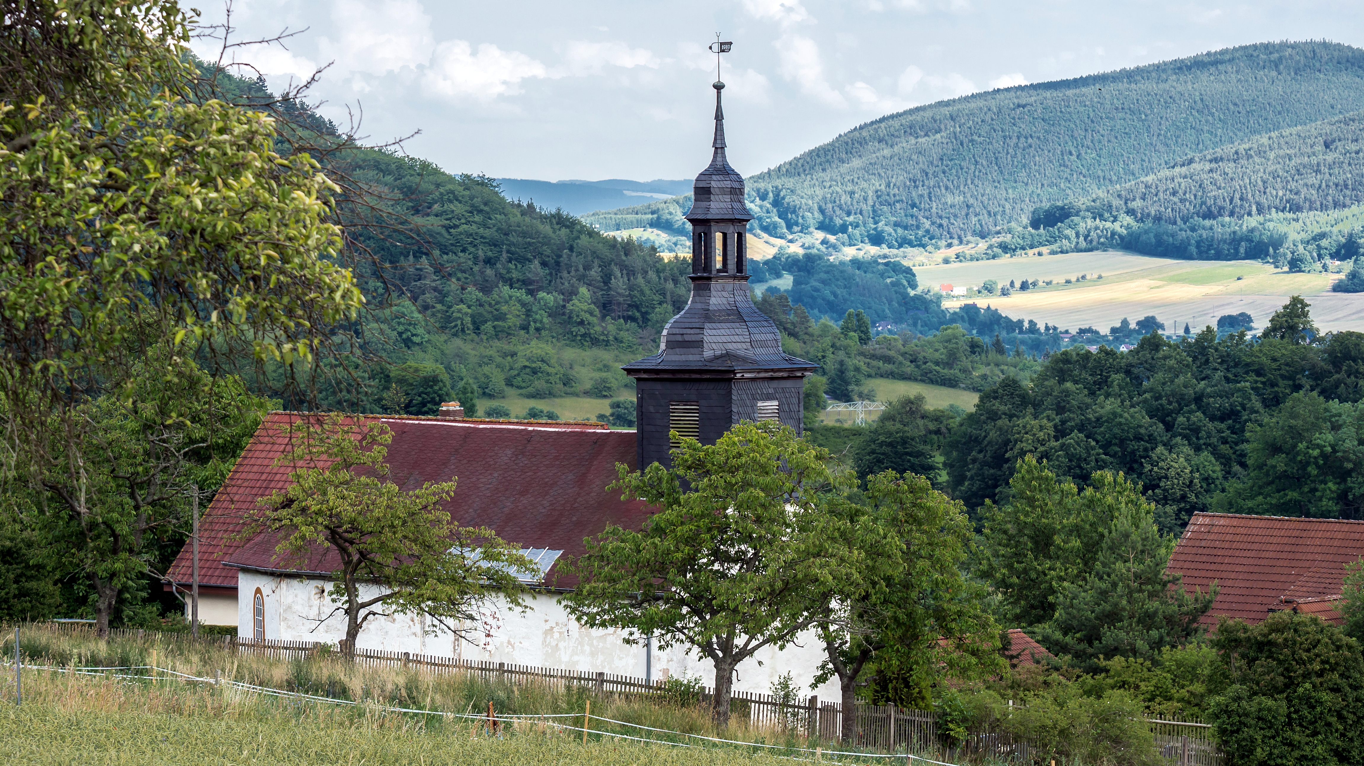 Kulturdenkmal Bad Blankenburg Gemeinde Kleingölitz Kirche am südwestlichen Ortsrand gelegen